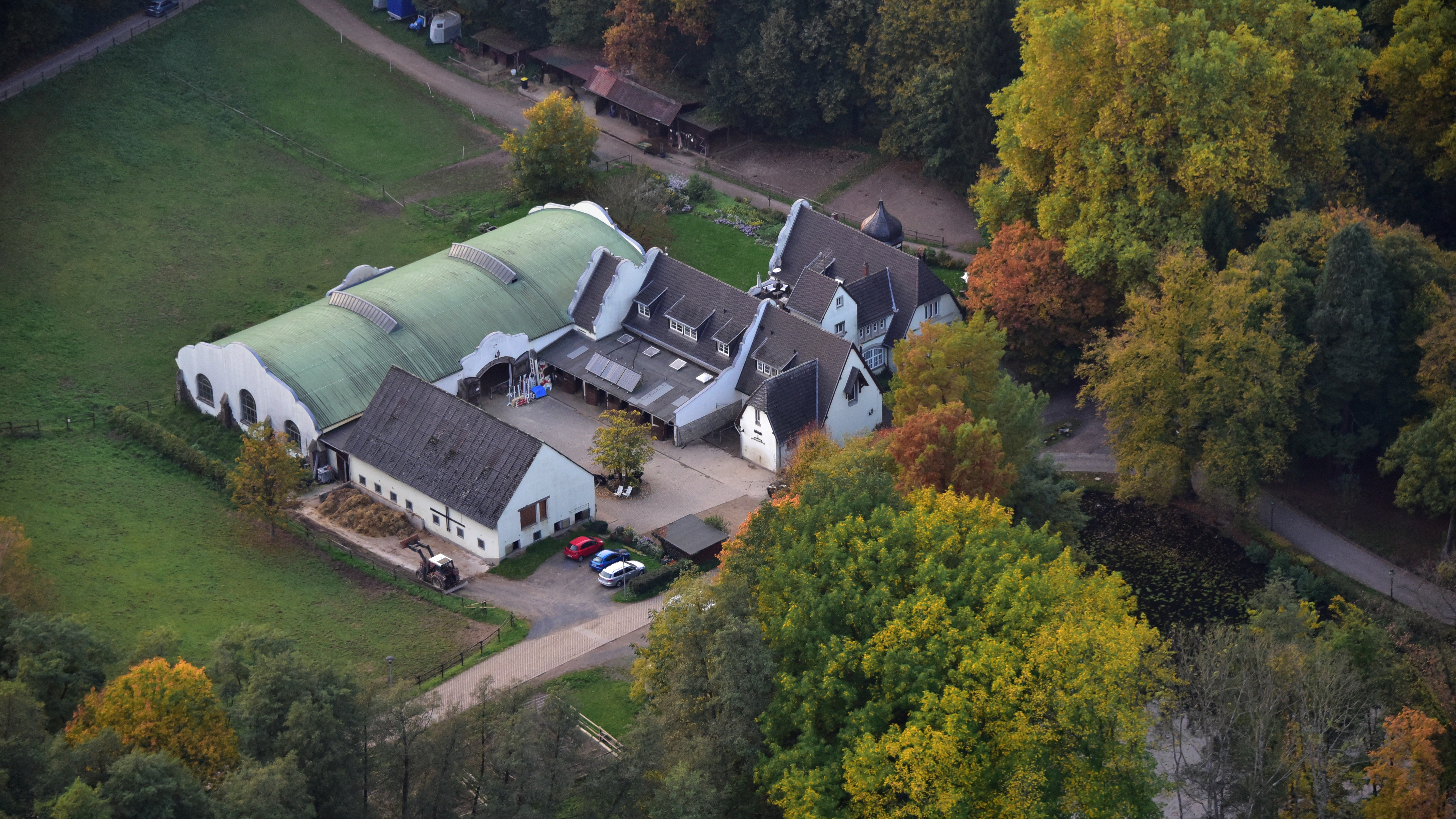 Gut Limpich mit Reithalle, Menzenberg 15, Bad Honnef: Luftaufnahme (2017)